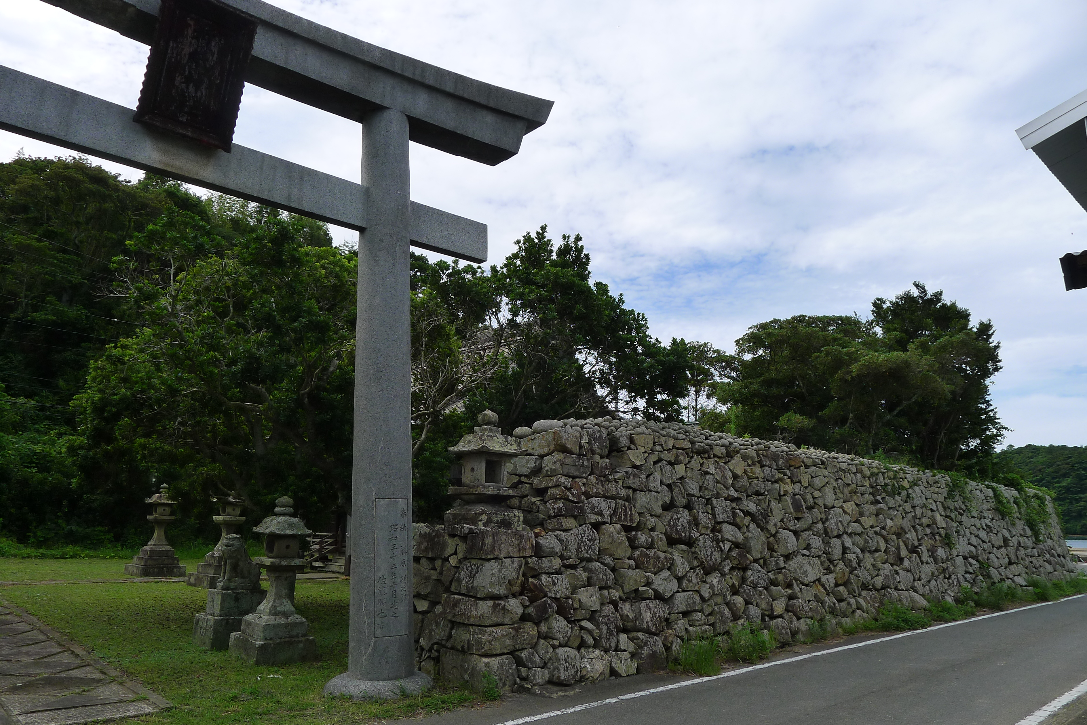 久賀島久賀地区の折紙神社